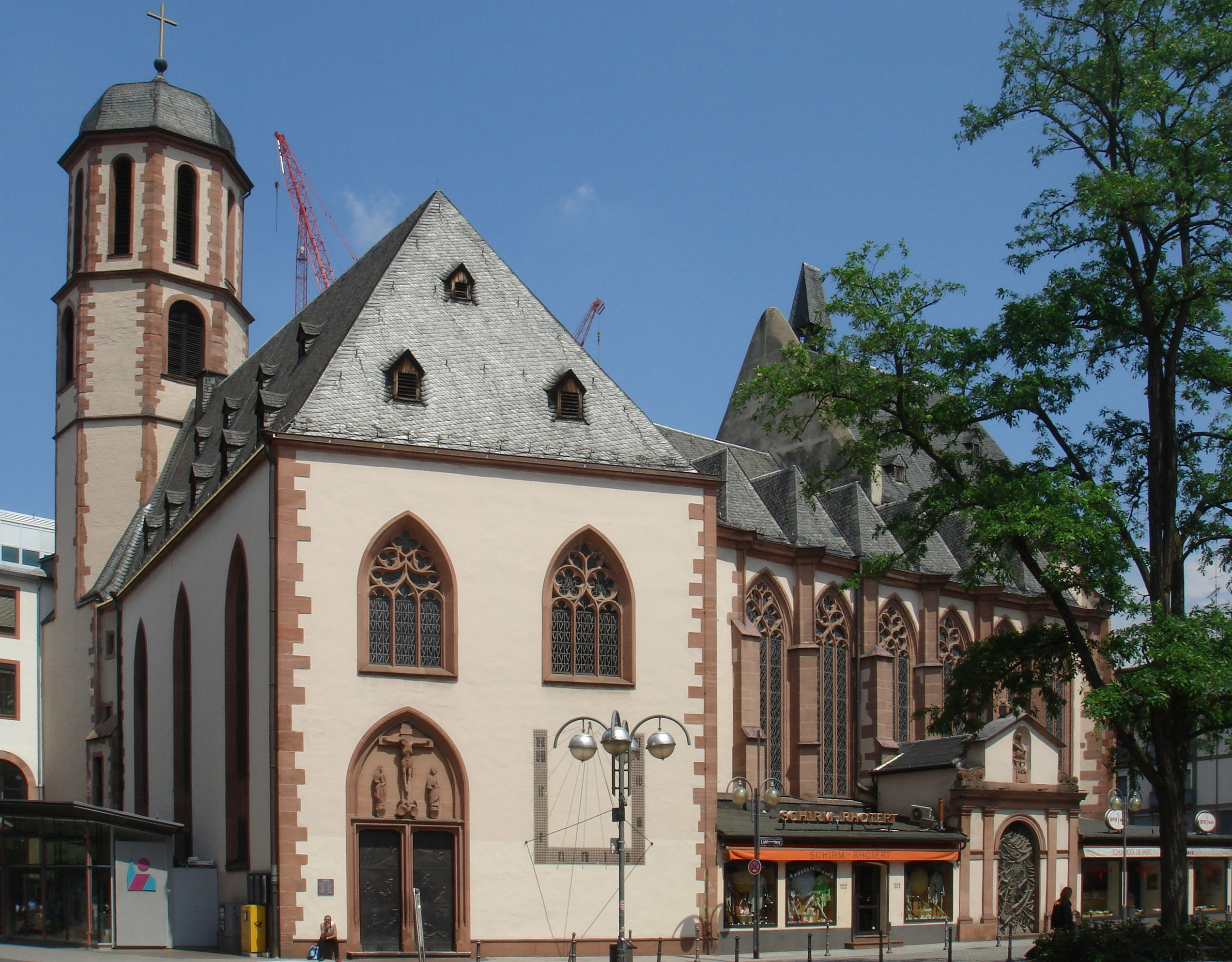 Liebfrauenkirche (Frankfurt) von Süden